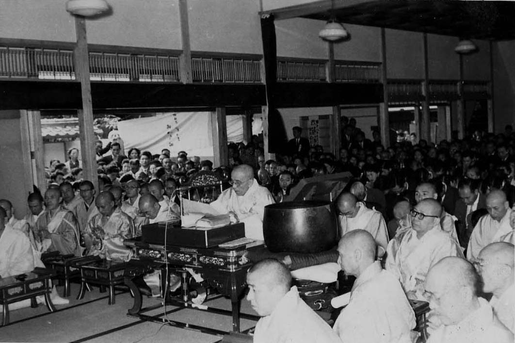 昭和32年10月本堂改築 日淳上人御親修での御会式